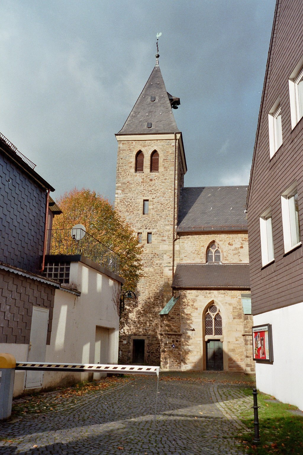 Jakobuskirche in Breckerfeld, Deutschland